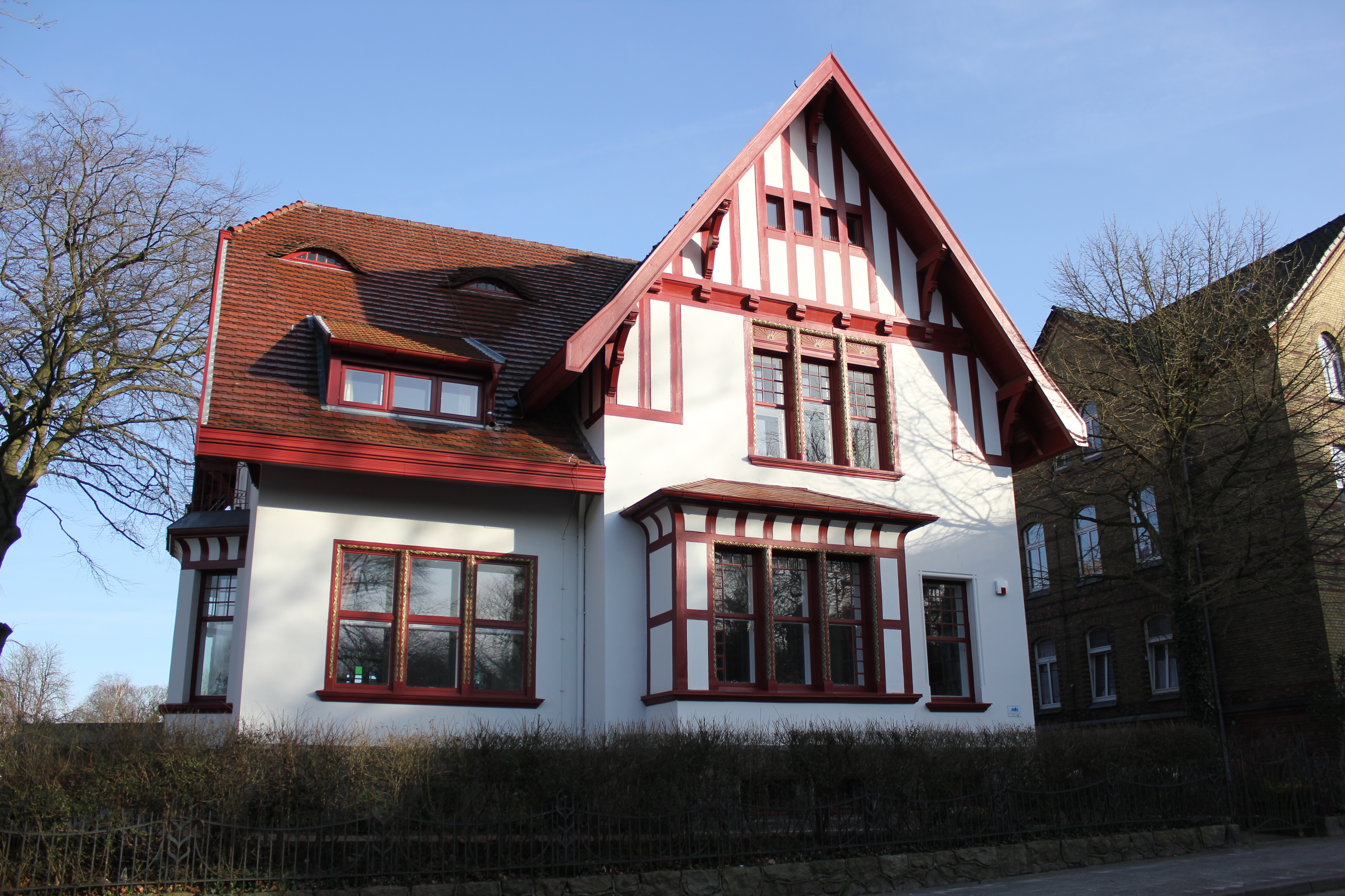 Das Jens-Jessen-Haus, Bild 003